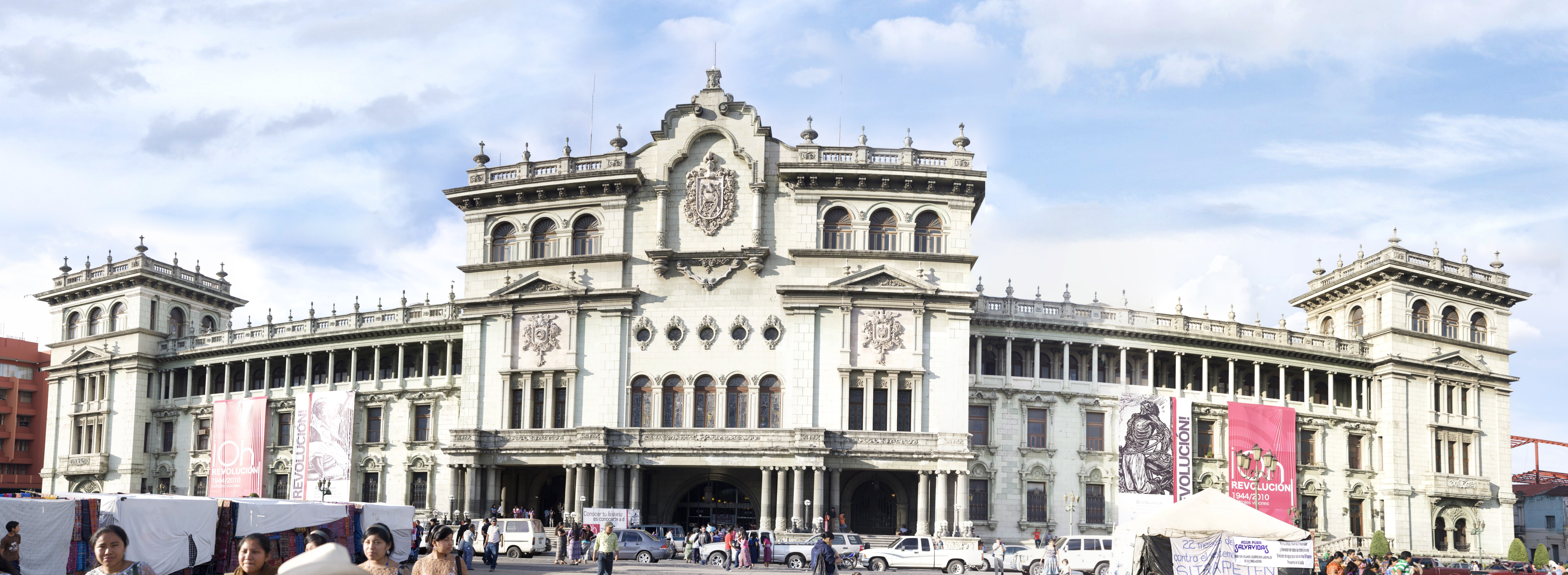 Panorámica de Palacio Nacional Guatemala